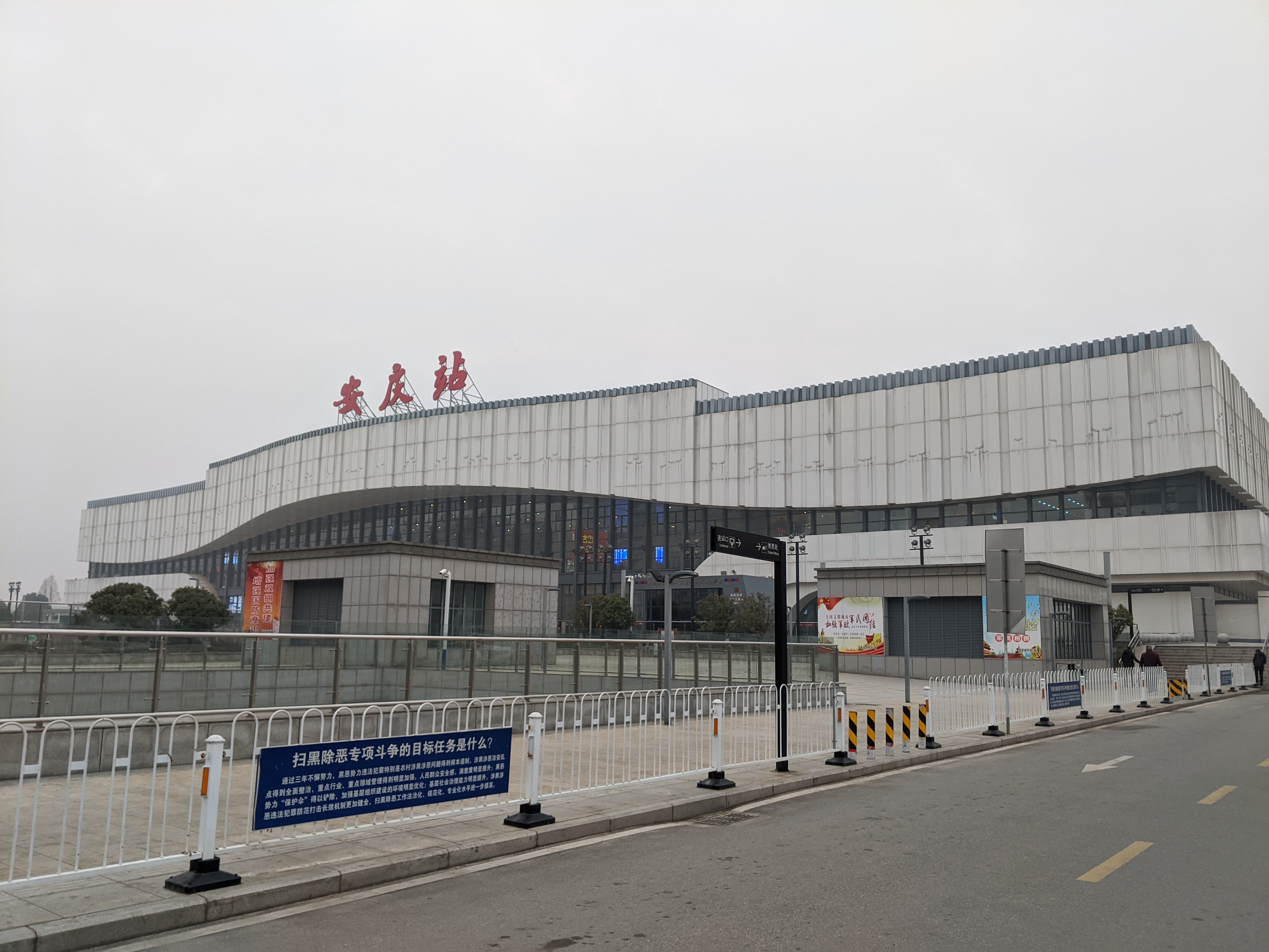 中文（中国大陆）: Anqing Railway Station